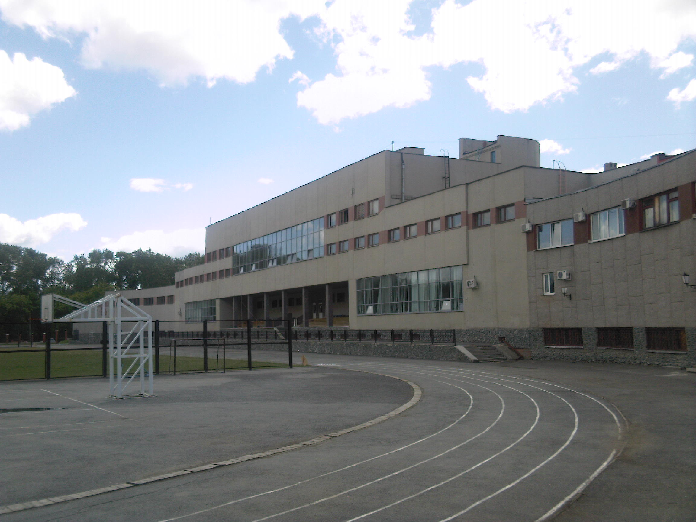 Предмет - спорткомплекс УрГУПСа, снято на камеру телефона Samsung G600 летом 2009 года.